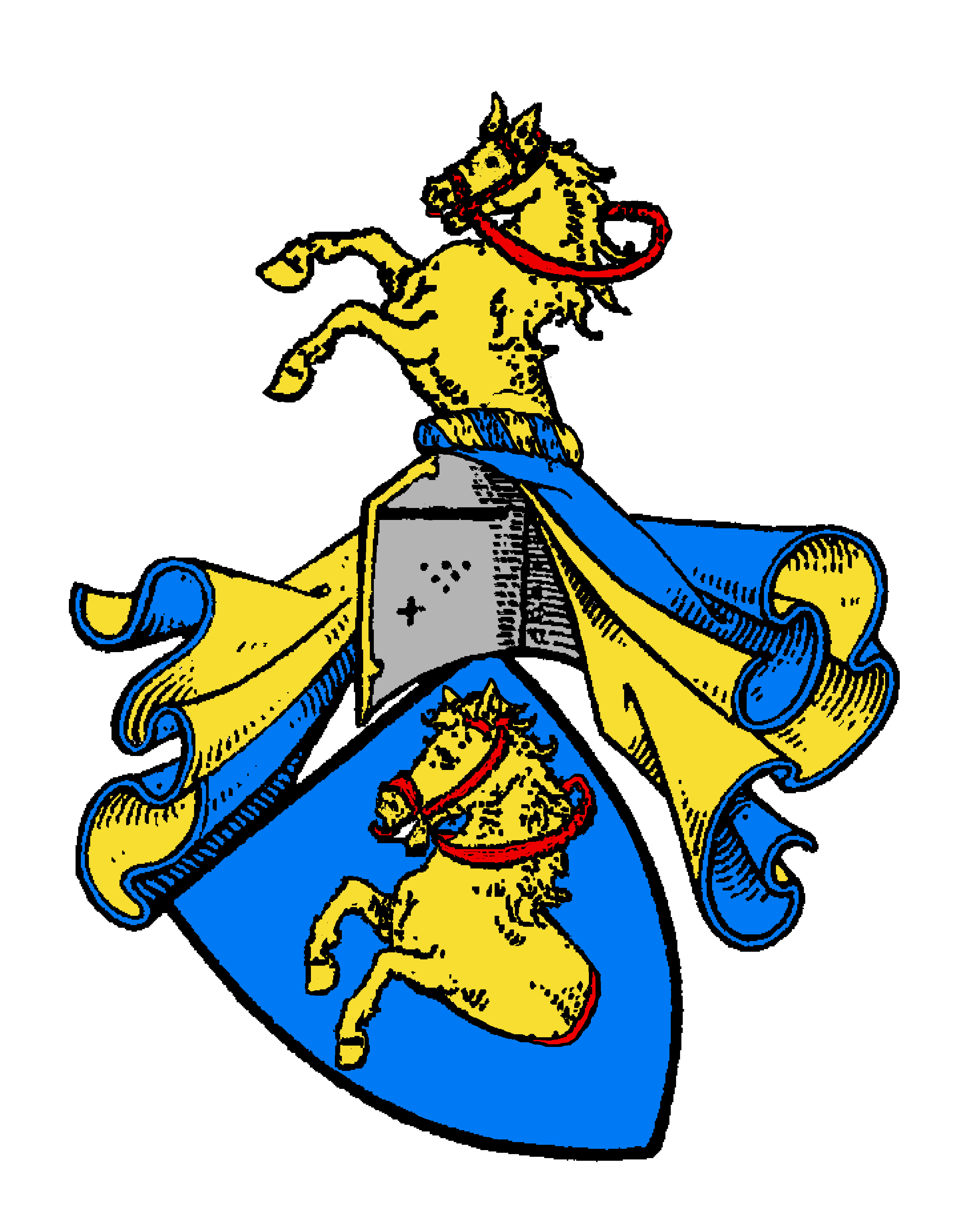 Stammwappen der von Malowetz (der Hauptlinie Malovec von Malovic und Kosoř)